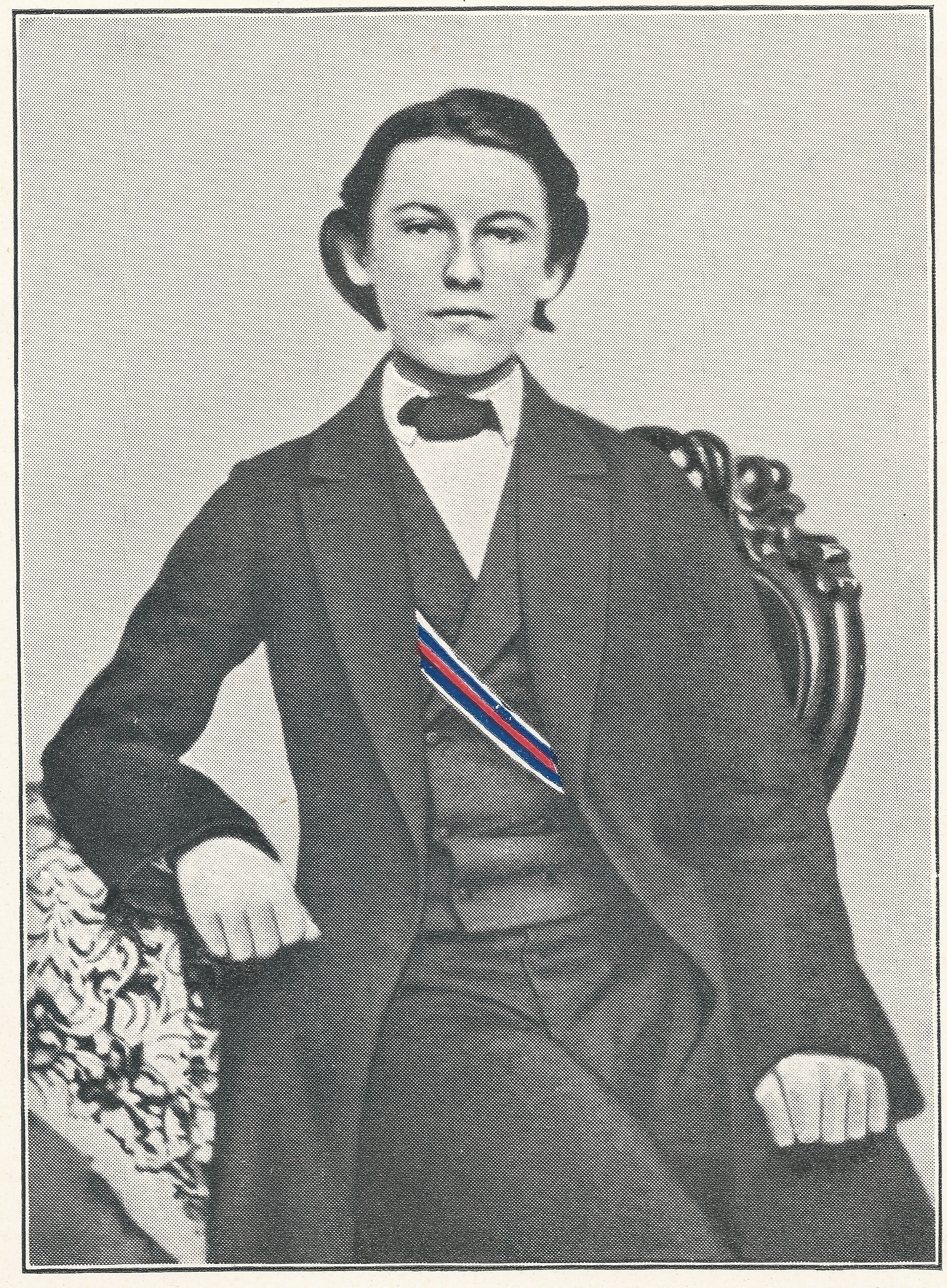 Porträtfotografie von Johannes Franz Kunze.